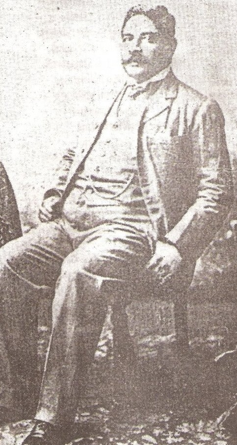 ഇദ്ദേഹം കേരളത്തിൽ ആദ്യമായി എം.ബി.ബി.എസ് ബിരുദം നേടിയയാളാണ്. അബർദീൻ യൂണിവേഴ്സിറ്റിയിൽ നിന്നാണ് ഇദ്ദേഹത്തിന് ബിരുദം ലഭിച്ചത്. തിരുവനന്തപുരത്തെ ഒരു റോഡ് ഇദ്ദേഹത്തിന്റെ പേരിലാണ് അറിയപ്പെടുന്നത്. ഇദ്ദേഹം രാജകുടുംബത്തിന്റെ ഔദ്യോഗിക ഡോക്ടറായിരുന്നുവത്രേ. അരുന്ധതി റോയ് ഇദ്ദേഹത്തിന്റെ ബന്ധുവാണ്.